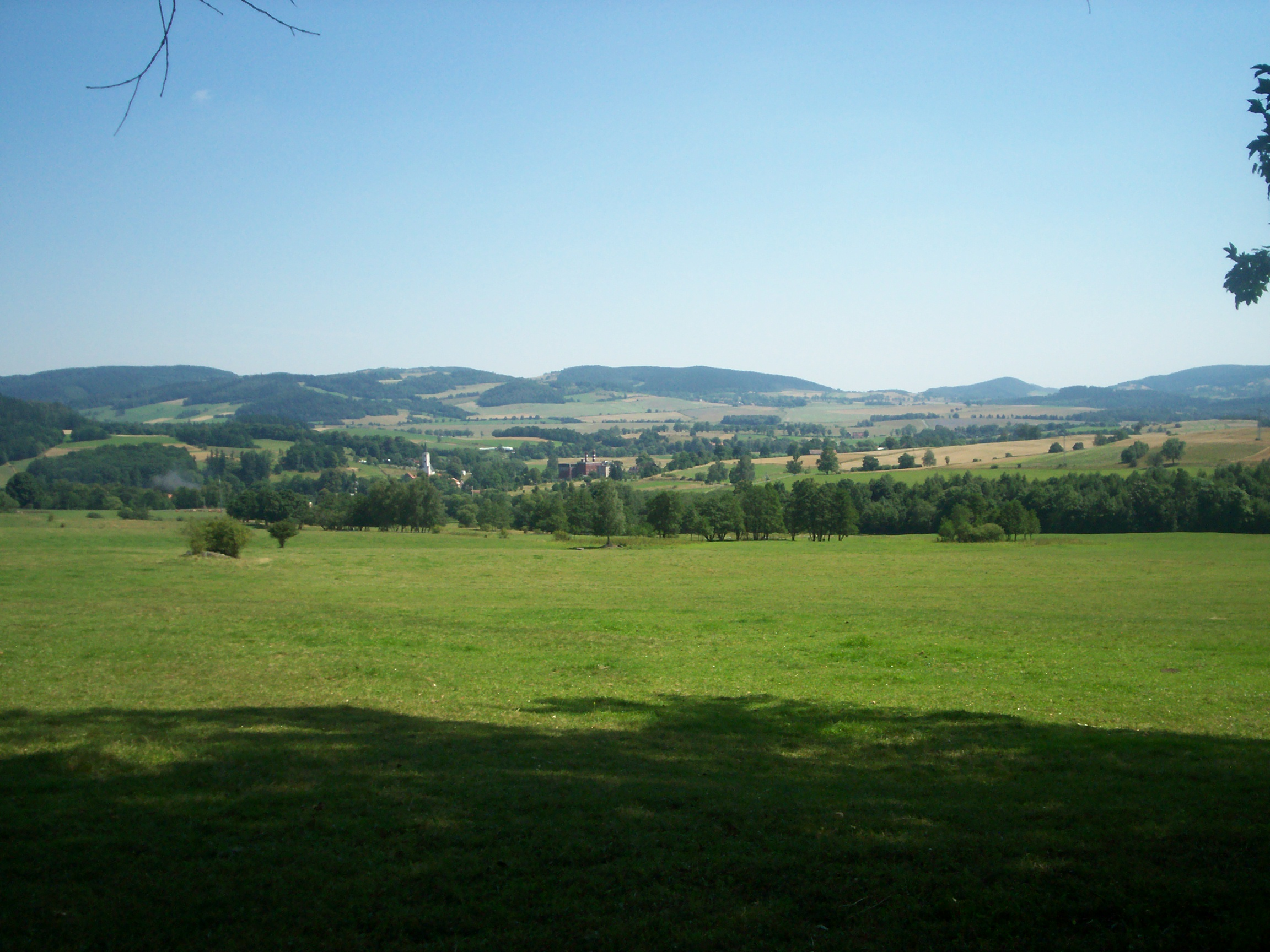 Ciechanowice - wieś w Polsce położona w województwie dolnośląskim, w powiecie kamiennogórskim, w gminie Marciszów, w przełomie Bobru, na pograniczu Gór Kaczawskich i Rudaw Janowickich w Sudetach Zachodnich..